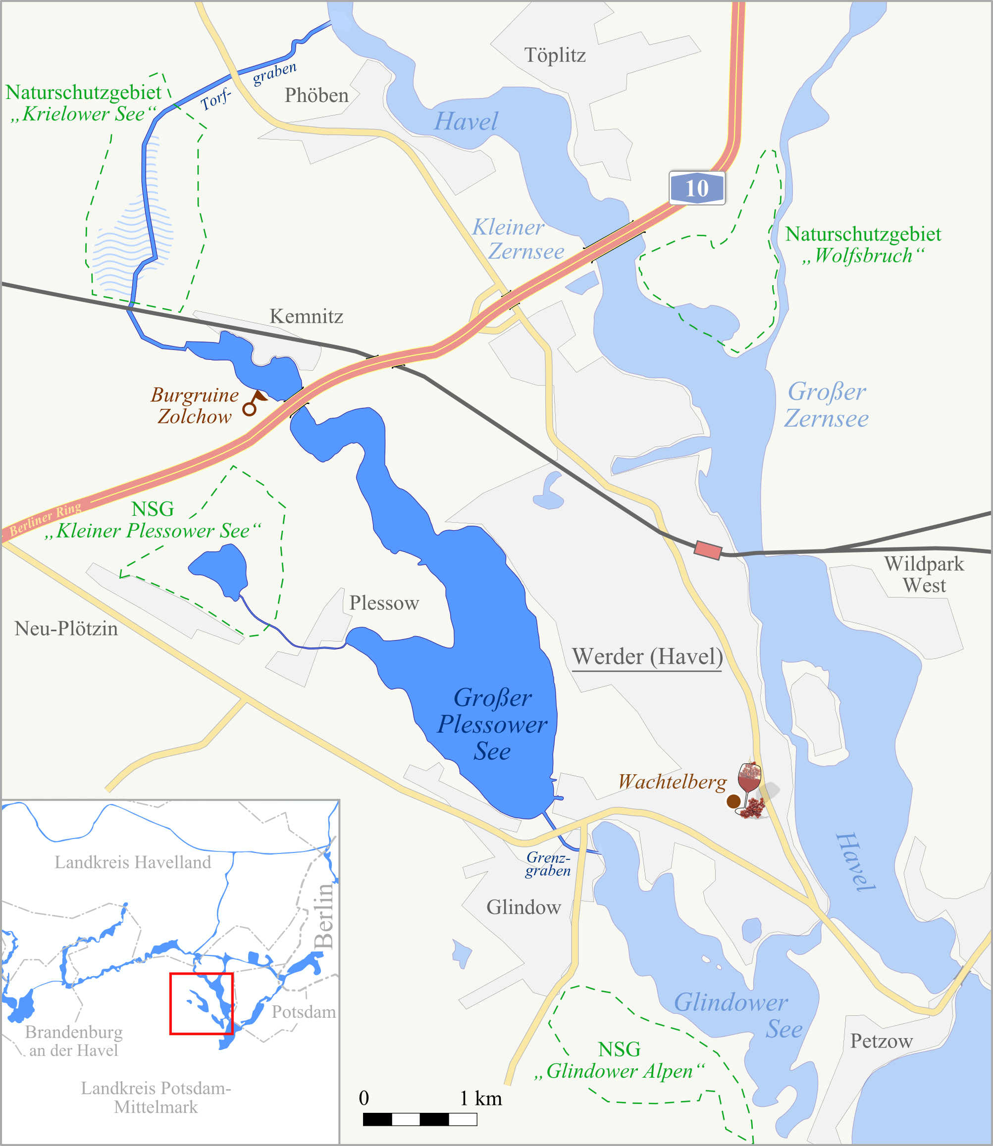 Lagekarte zum Großen Plessoweer See